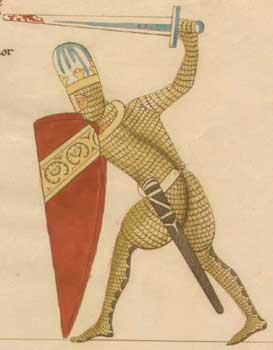 Knight in Hortus Deliciarum